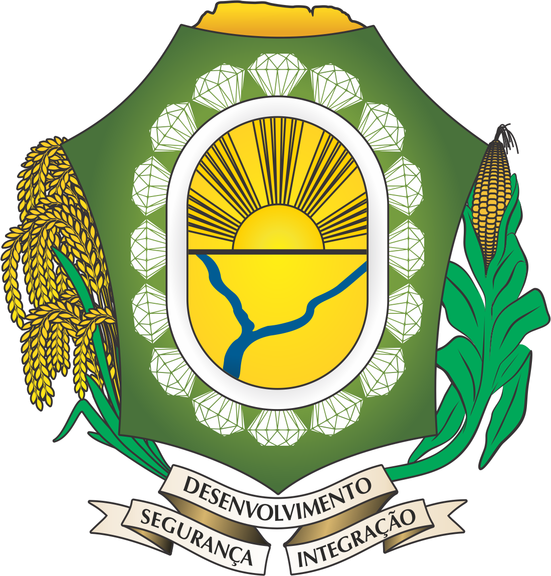 Coat of arms of Boa Vista city, in Roraima, Brazil. All the images of Brazilian states, cities, flags and coat of arms (official symbols) are in public domain. Brasão do estado da cidade de Boa Vista, em Roraima, Brasil. Todas as imagens de bandeiras de estados, cidades brasileiras e brasões (símbolos oficiais) estão em domínio público.